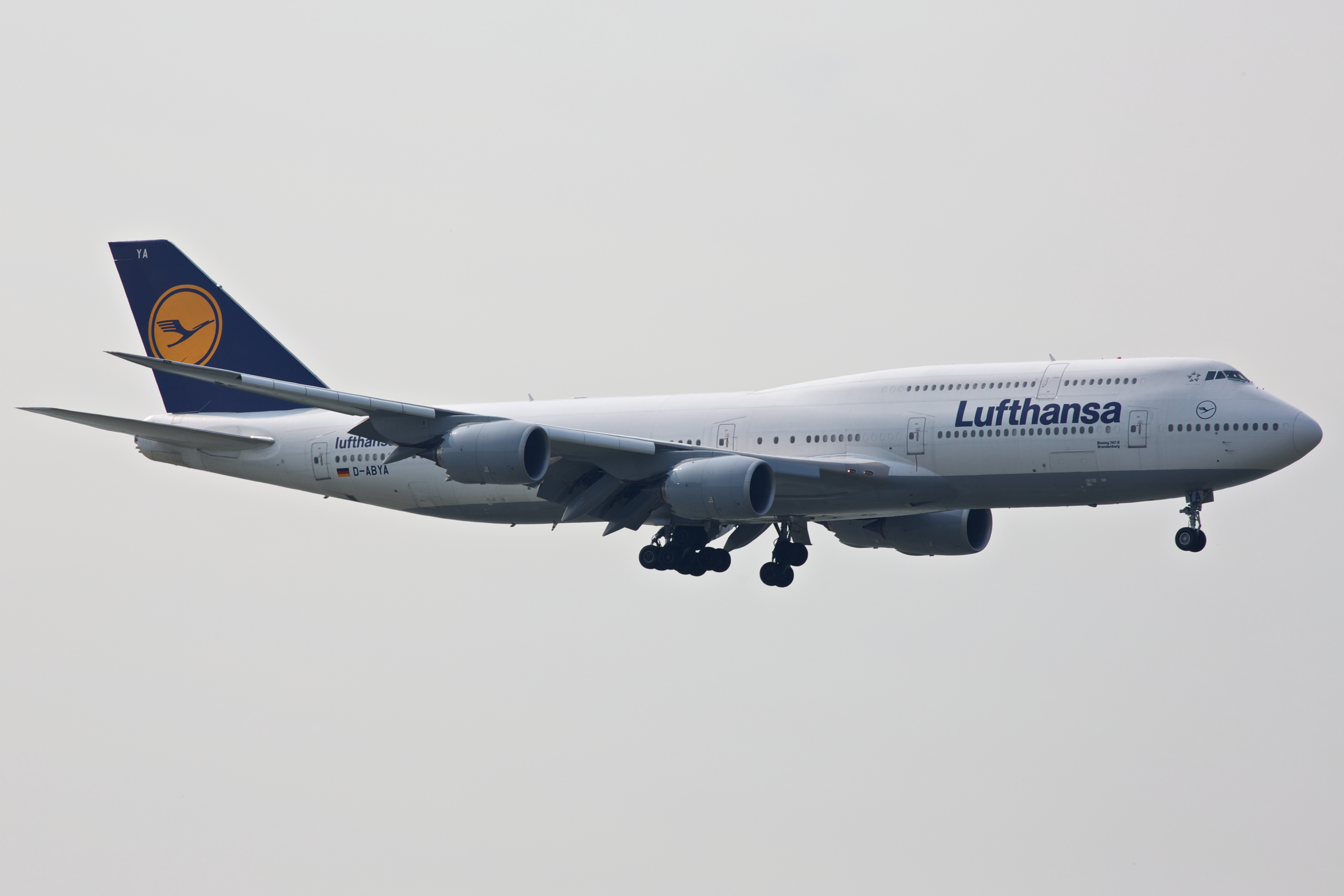 D-ABYA | C/N 37827 | 747-830 | Lufthansa | Hong Kong